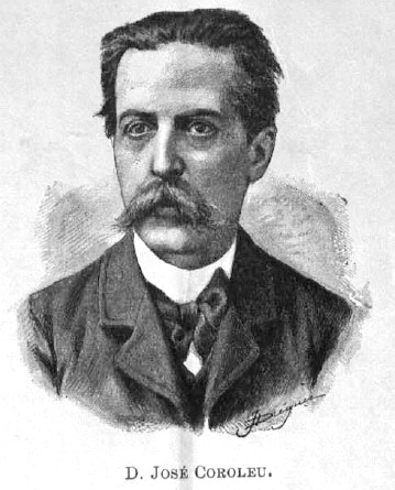 Josep Coroleu i Inglada (Barcelona 16 d'agost de 1839 - 28 de maig de 1895) fou un historiador i polític català